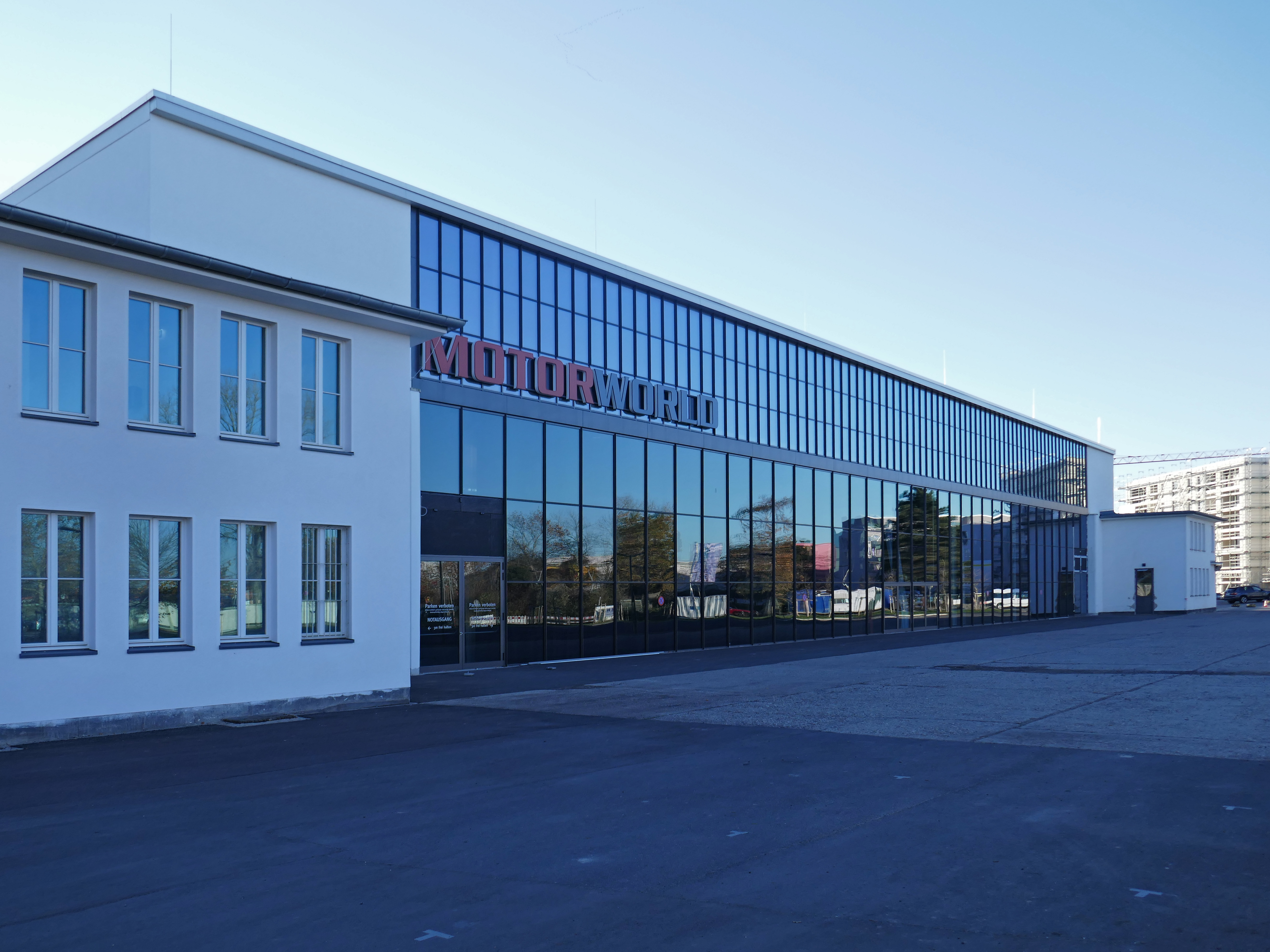 Die Motorworld Köln auf dem Gelände des ehemaligen Flughafen Köln-Butzweilerhof. Eröffnet am 16. Juni 2018.